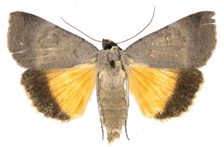 Lygephila lubrosa